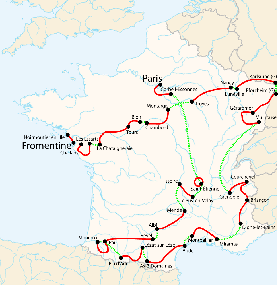 Tour de France 2005